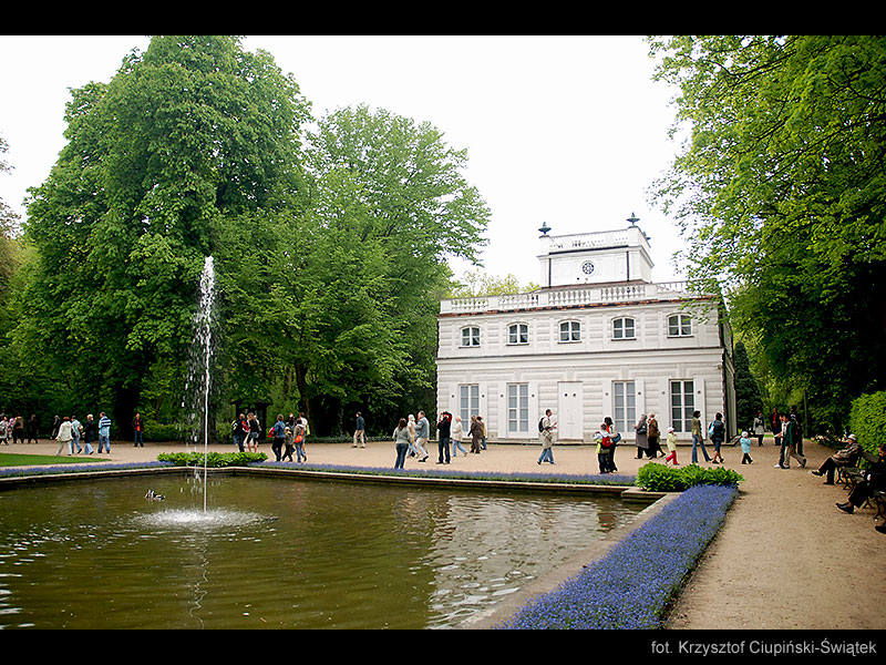 Biały domek w Łazienkach Królewskich, Warszawa.